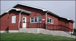 Senator Ambroise H. Comeau Memorial Library